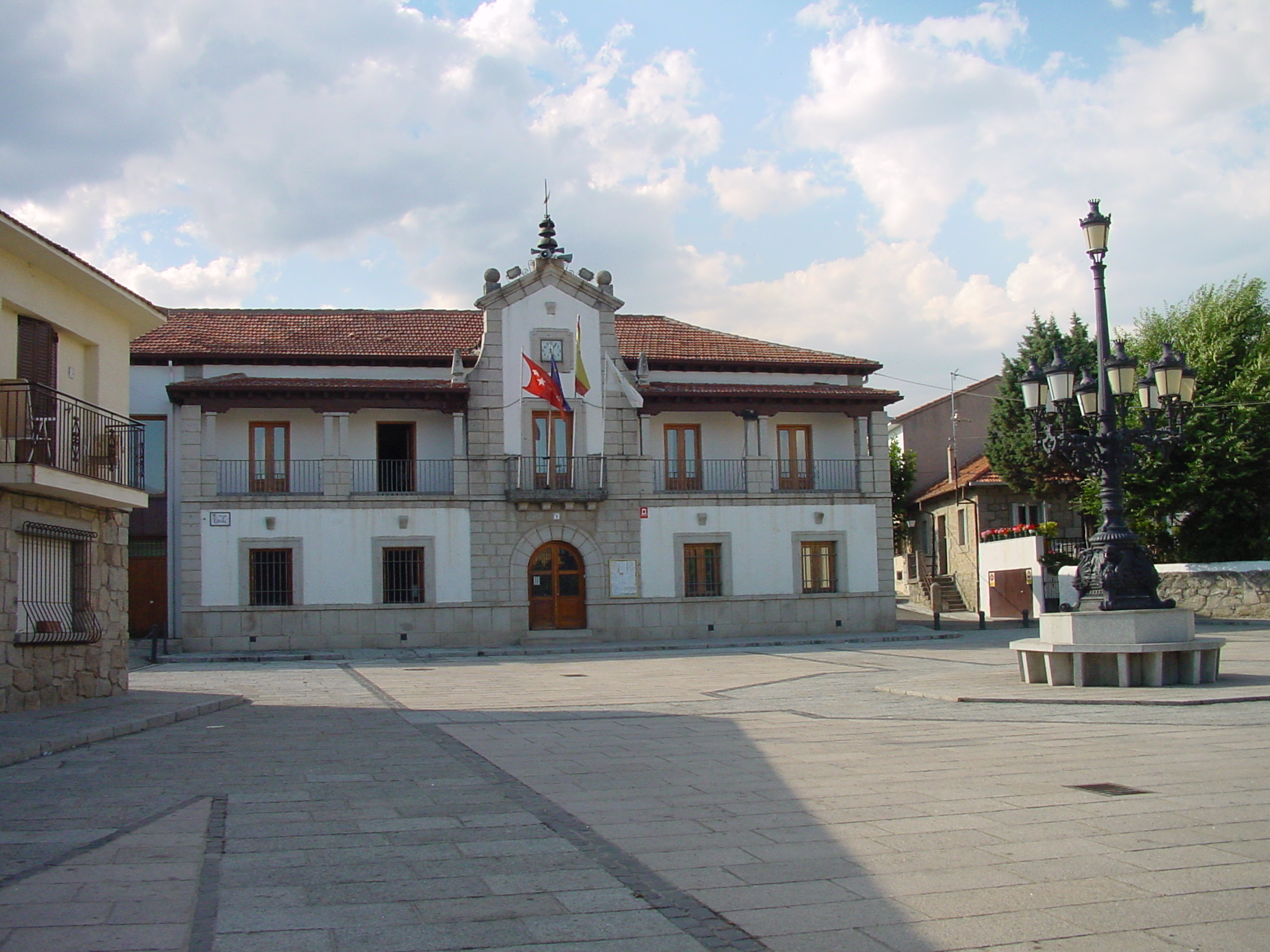 Ayuntamiento de Los Molinos.